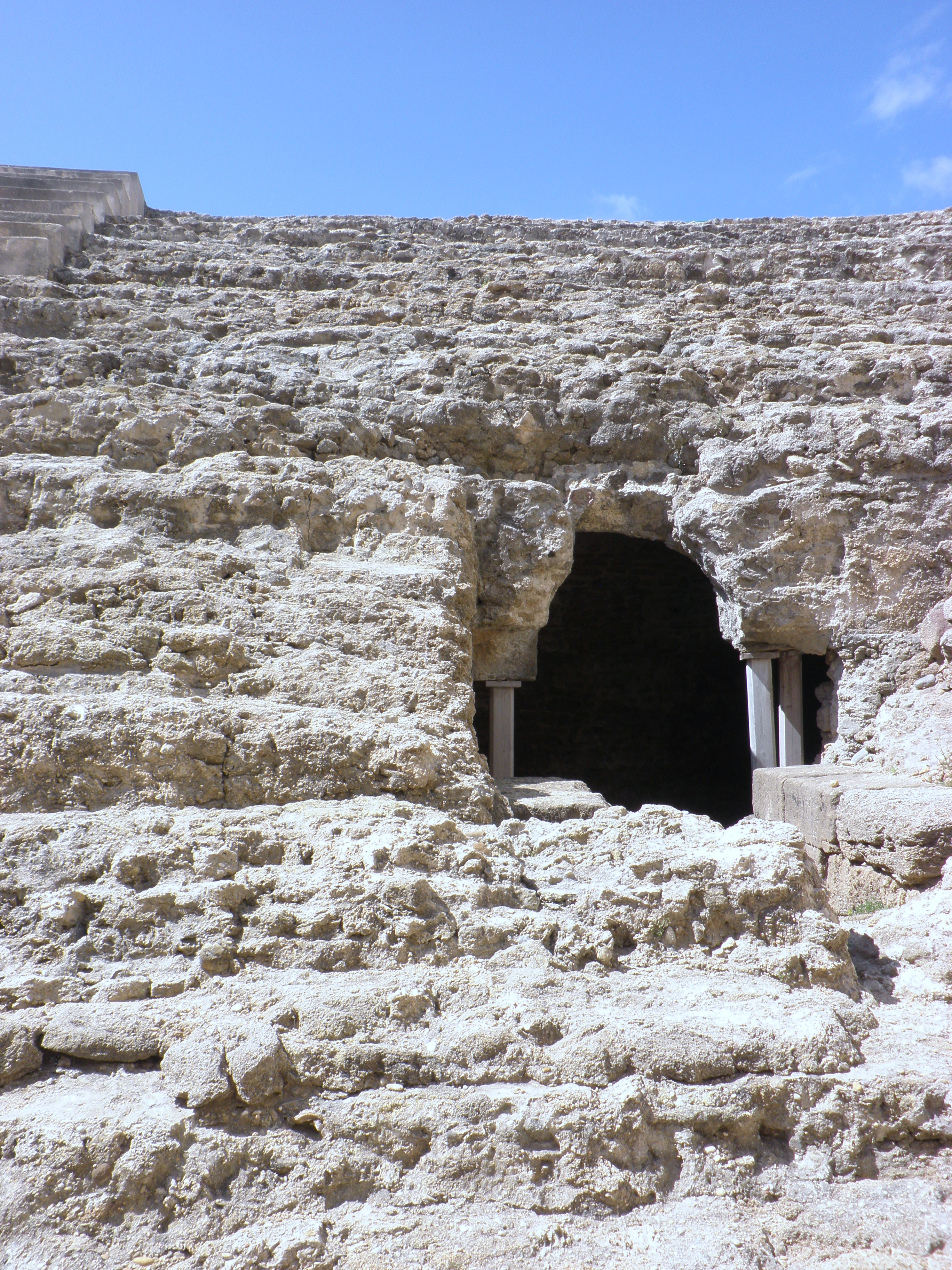 Teatro Romano de Cádiz, España